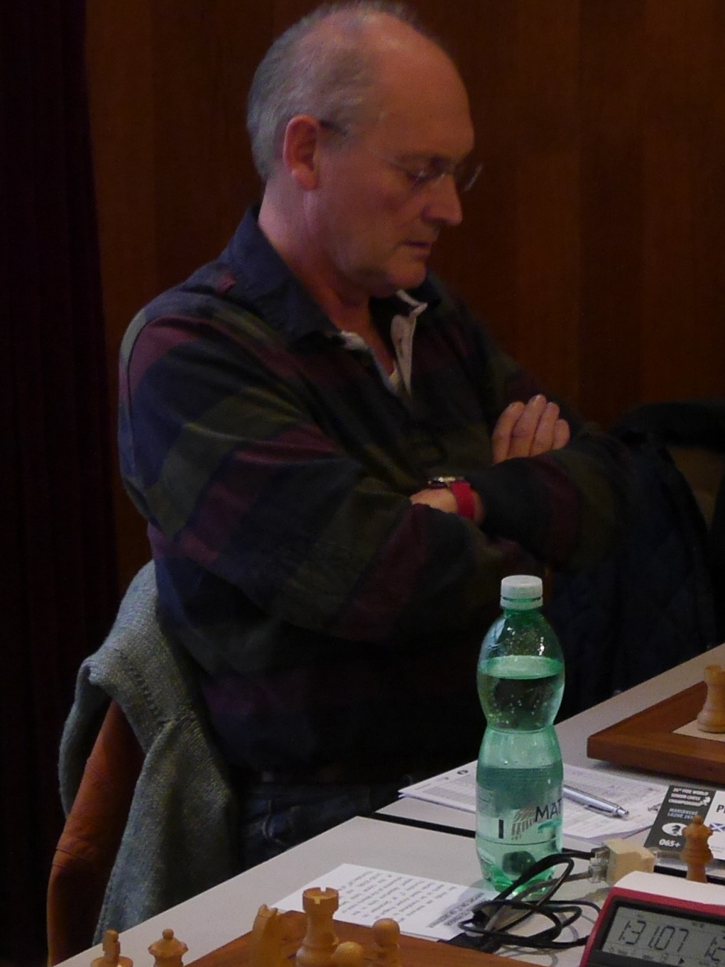 Craig W Pritchett, Schachweltmeisterschaft der Senioren 2016 in Marienbad.